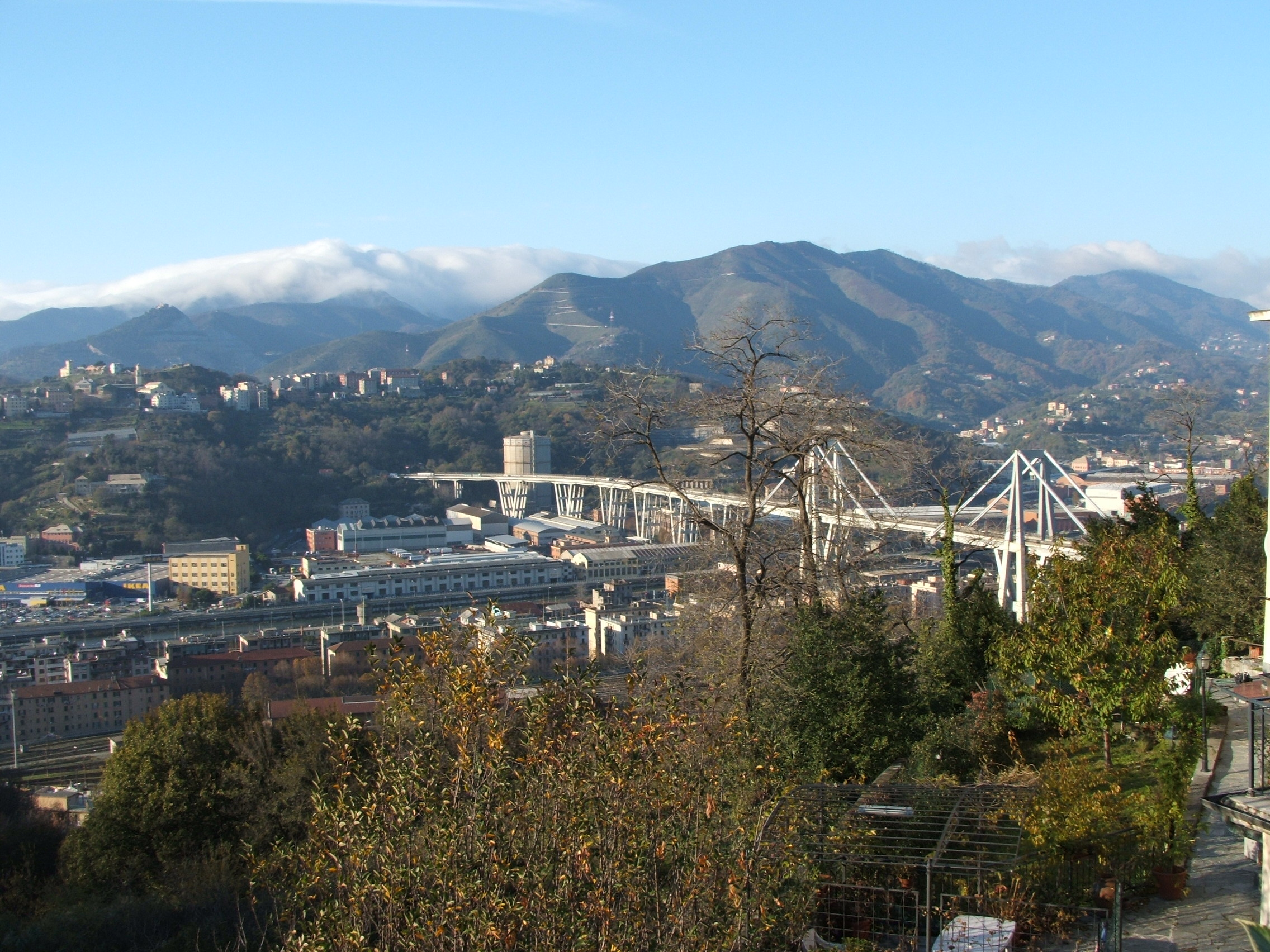 Genova, panorama sulla Valpolcevera. In primo piano il ponte autostradale